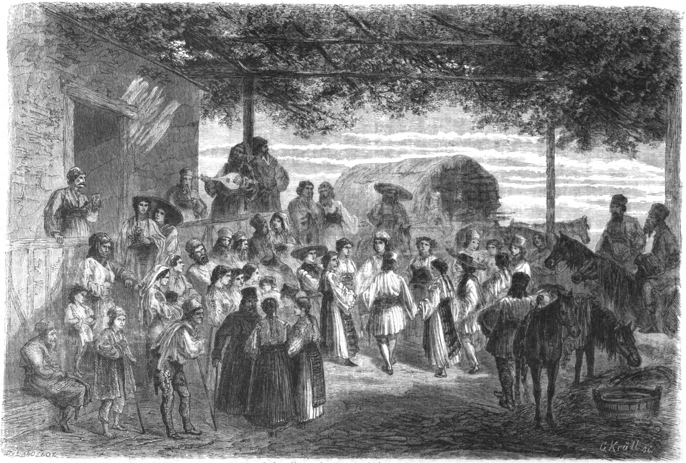 La hora, danse valaque